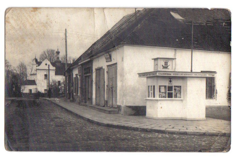 Костел Святої Трійці в Любомлі 29.09.1935.jpg: Костел Святої Трійці в Любомлі